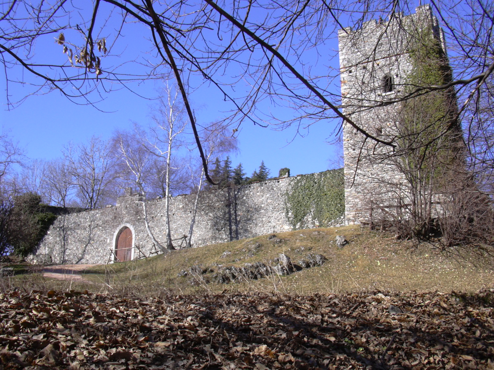 Rocca medioevale sita nel comune di Orino, provincia di Varese, all'interno del Parco regionale Campo dei Fiori.